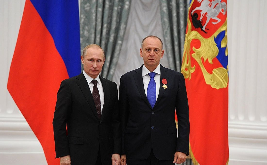 Орденом «За заслуги перед Отечеством» IV степени награждён Дмитрий Пумпянский